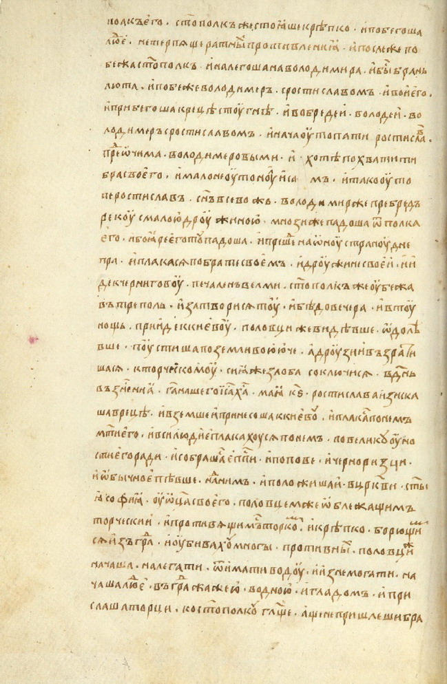 Радзивилловская (Кёнигсбергская) летопись.